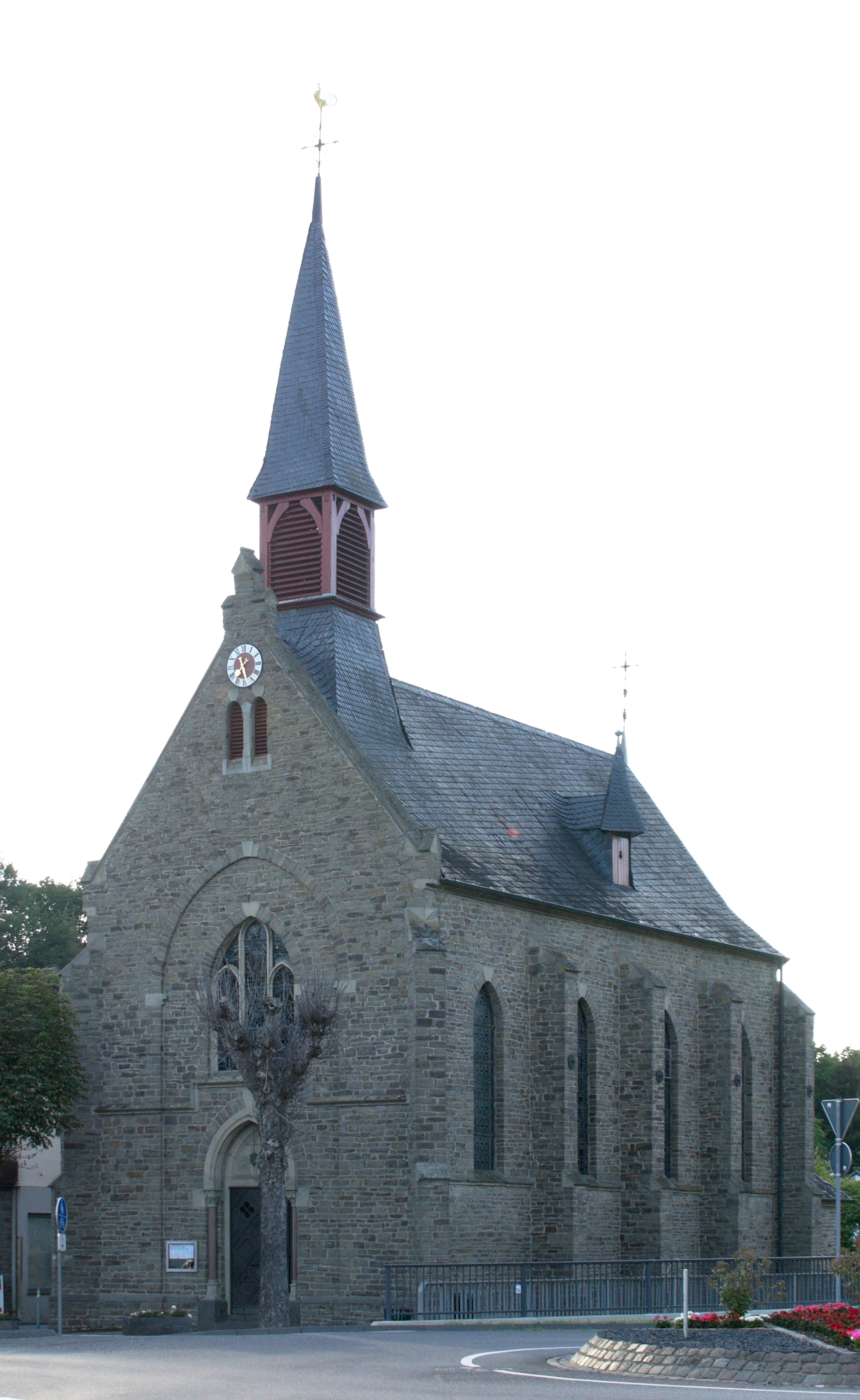 Kirche St. Brigida in Eicherscheid, Bad Münstereifel. Die Kirche ist das Denkmal Nr. 264 auf der Denkmalliste von Bad Münstereifel.